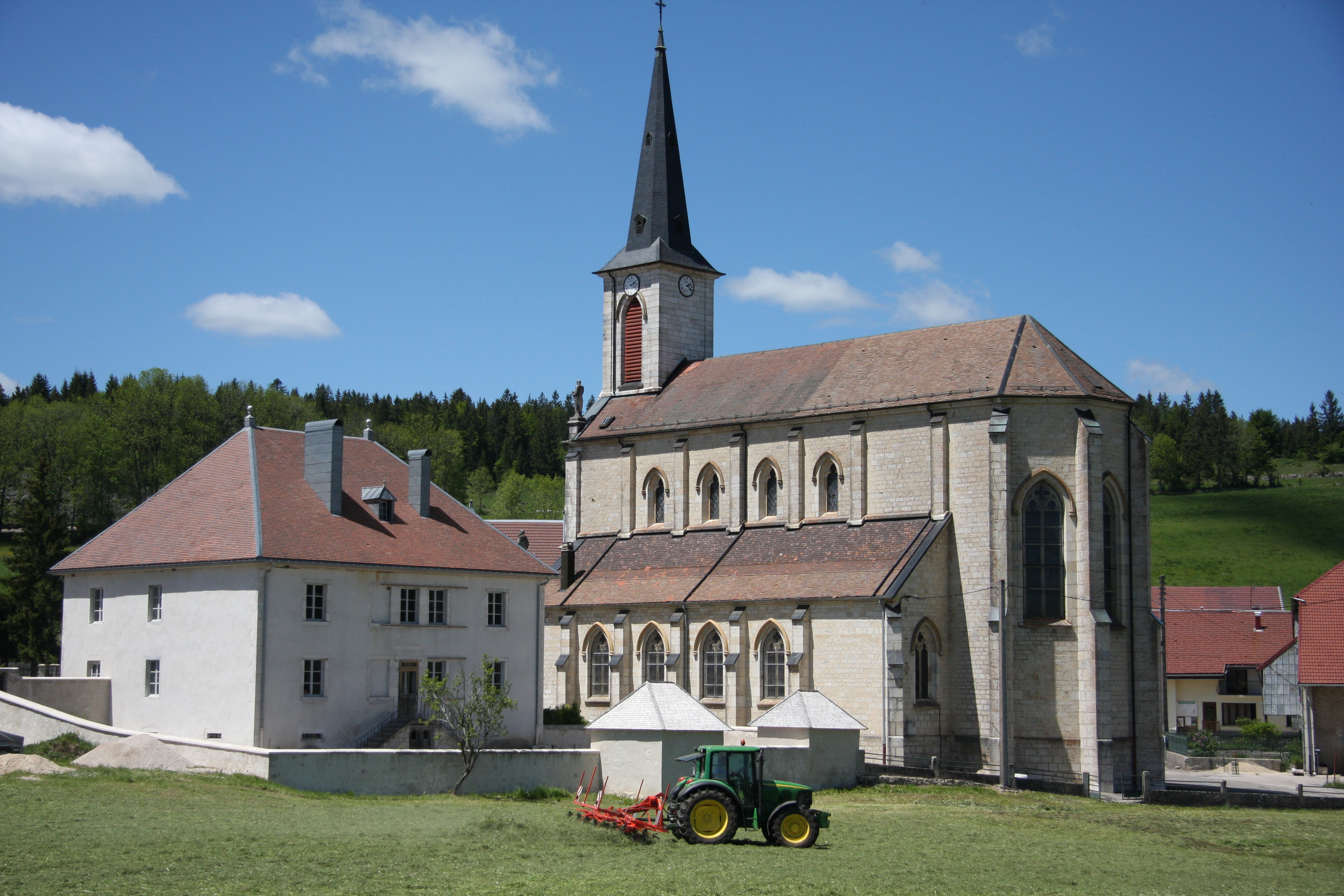 Église et presbytère de Remoray (Doubs, France)